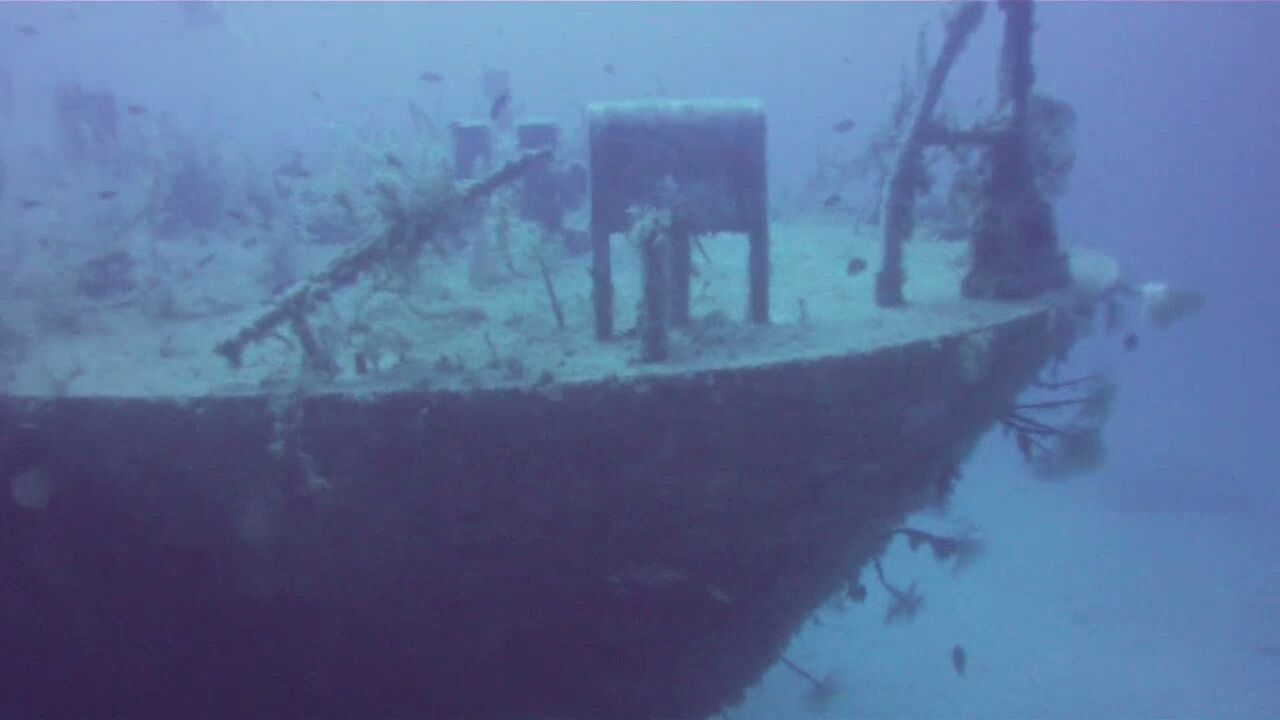 Malte : l'épave du P29